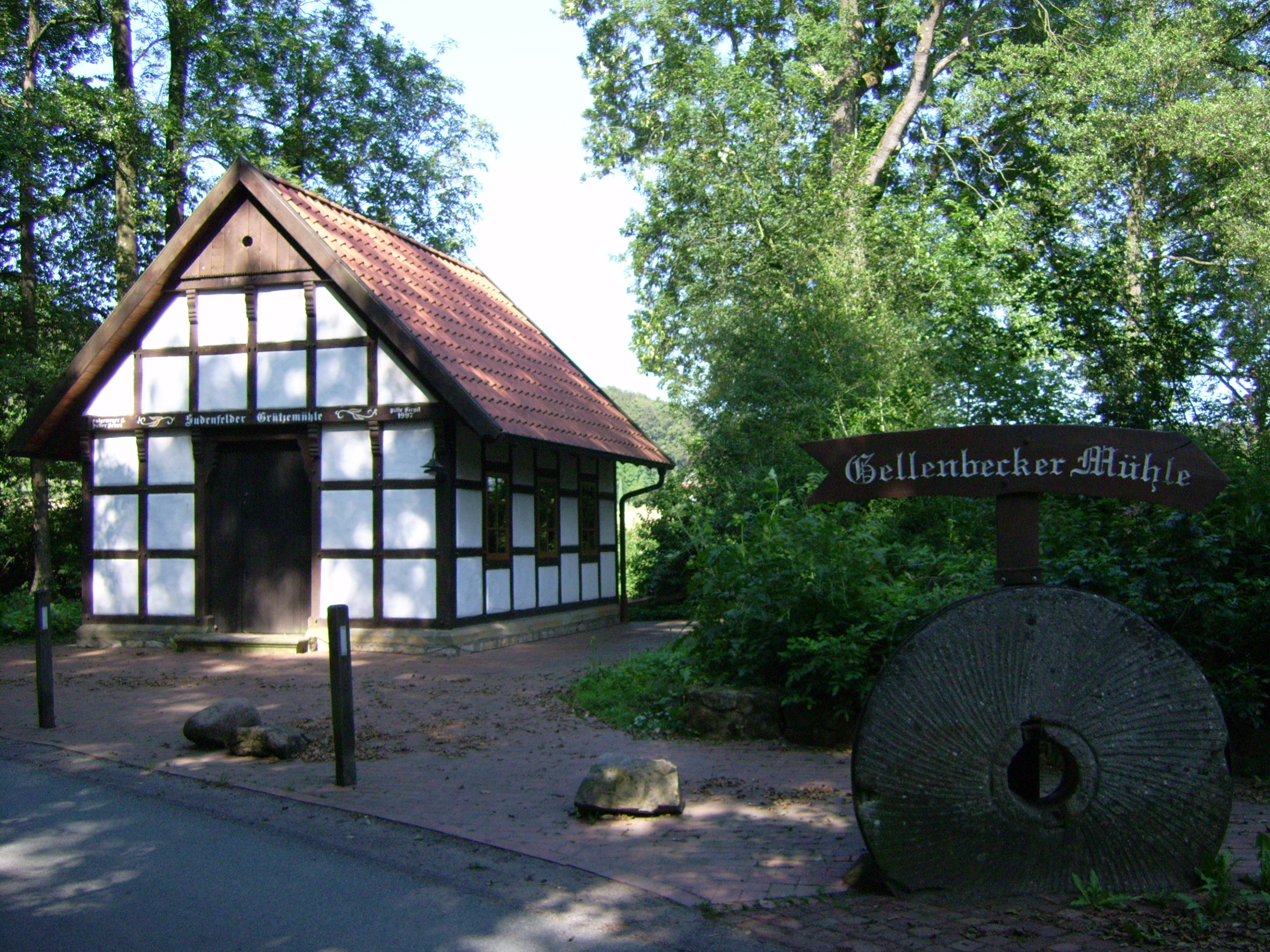 Nachbau der Sudenfelder Grützemühle in Hagen am Teutoburger Wald